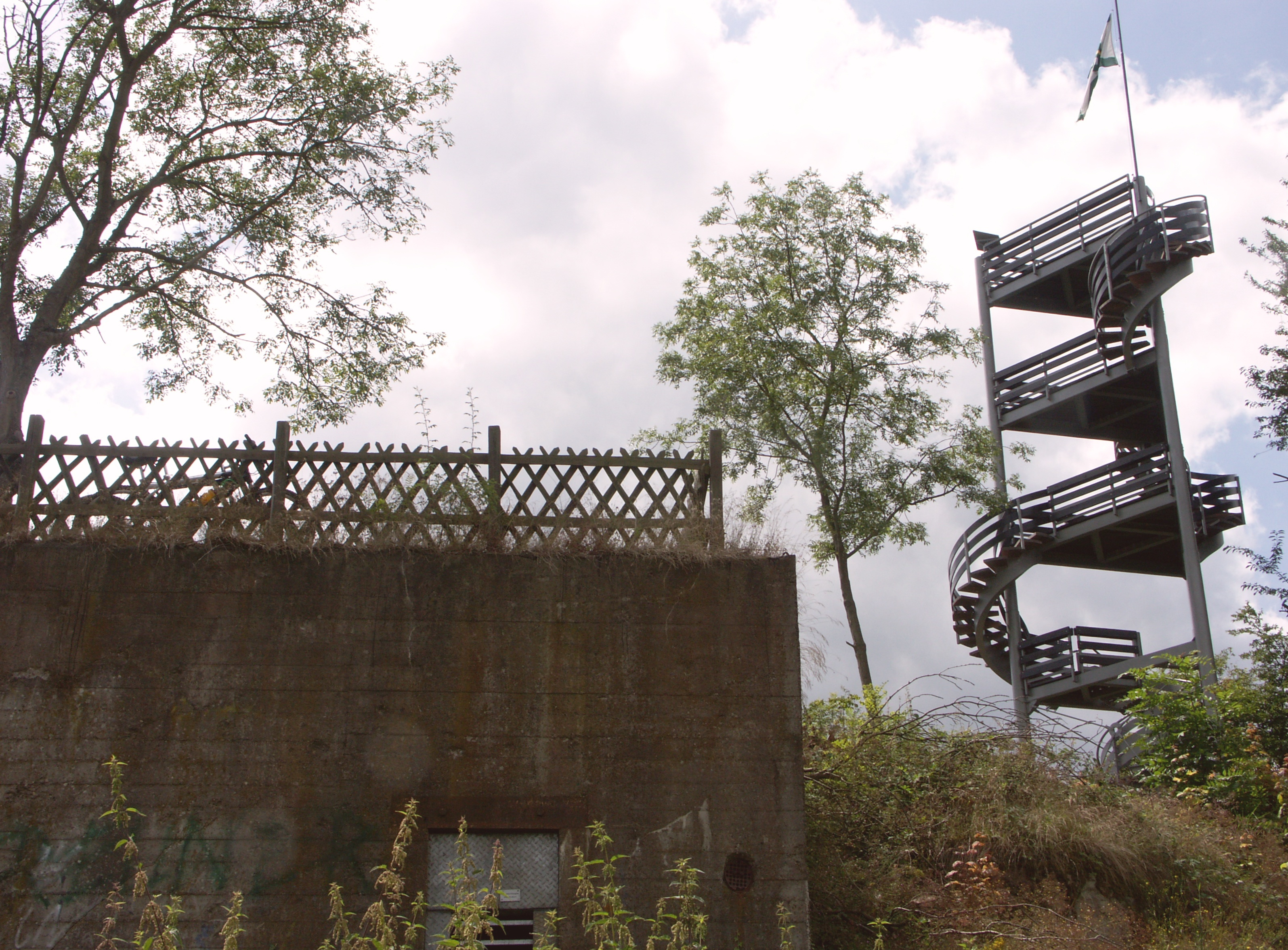 Top of Hill 400, Burgberg near Bergstein, Hürtgenwald, Germany, with World War II bunker and Krawutschketurm